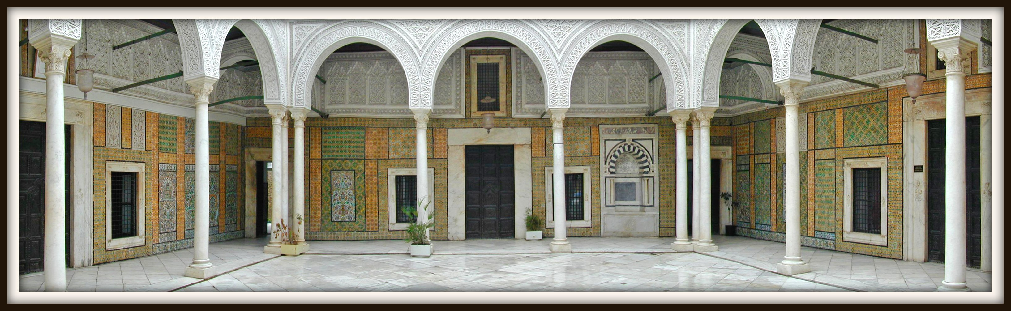 Le Dar Hussein est un palais de la médina de Tunis, il abrite aujourd'hui l'institut national du patrimoine tunisien. Le patio est en marbre blanc (sol et colonnes) avec des faiences de Kallaline et des stucs très ouvragés.